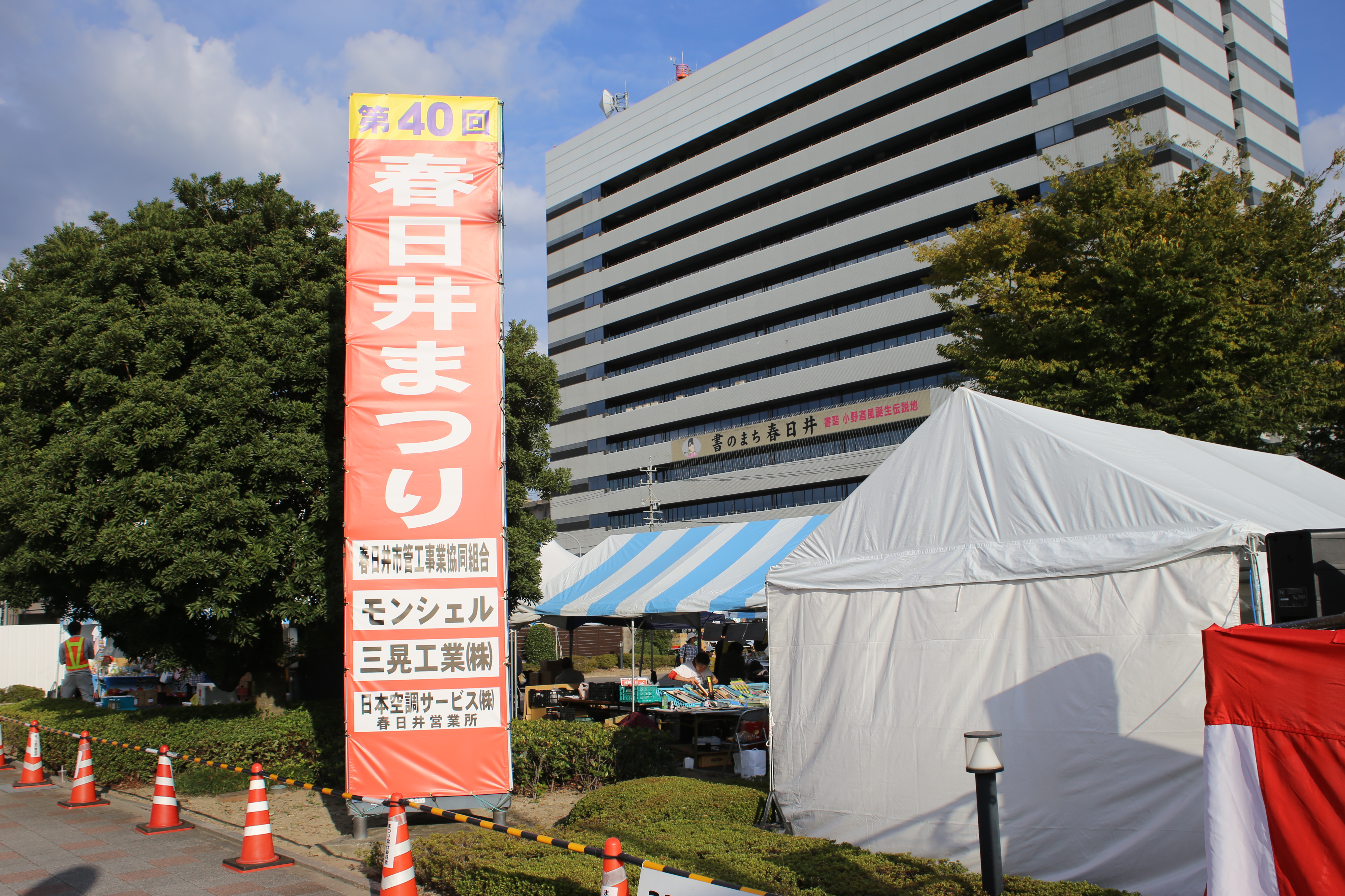 愛知県春日井市で行われた春日井まつりの様子